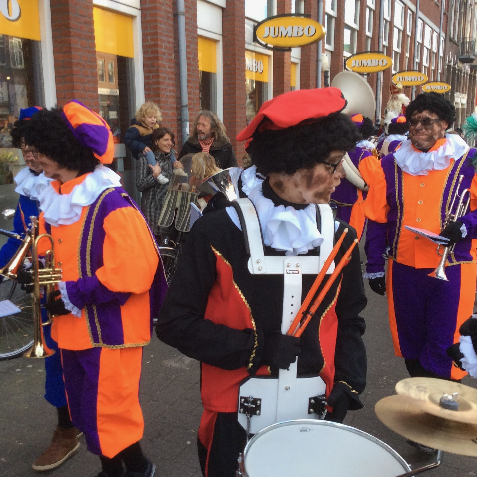 Optocht met roetveegpieten op de Schiedamseweg, Delfshaven.